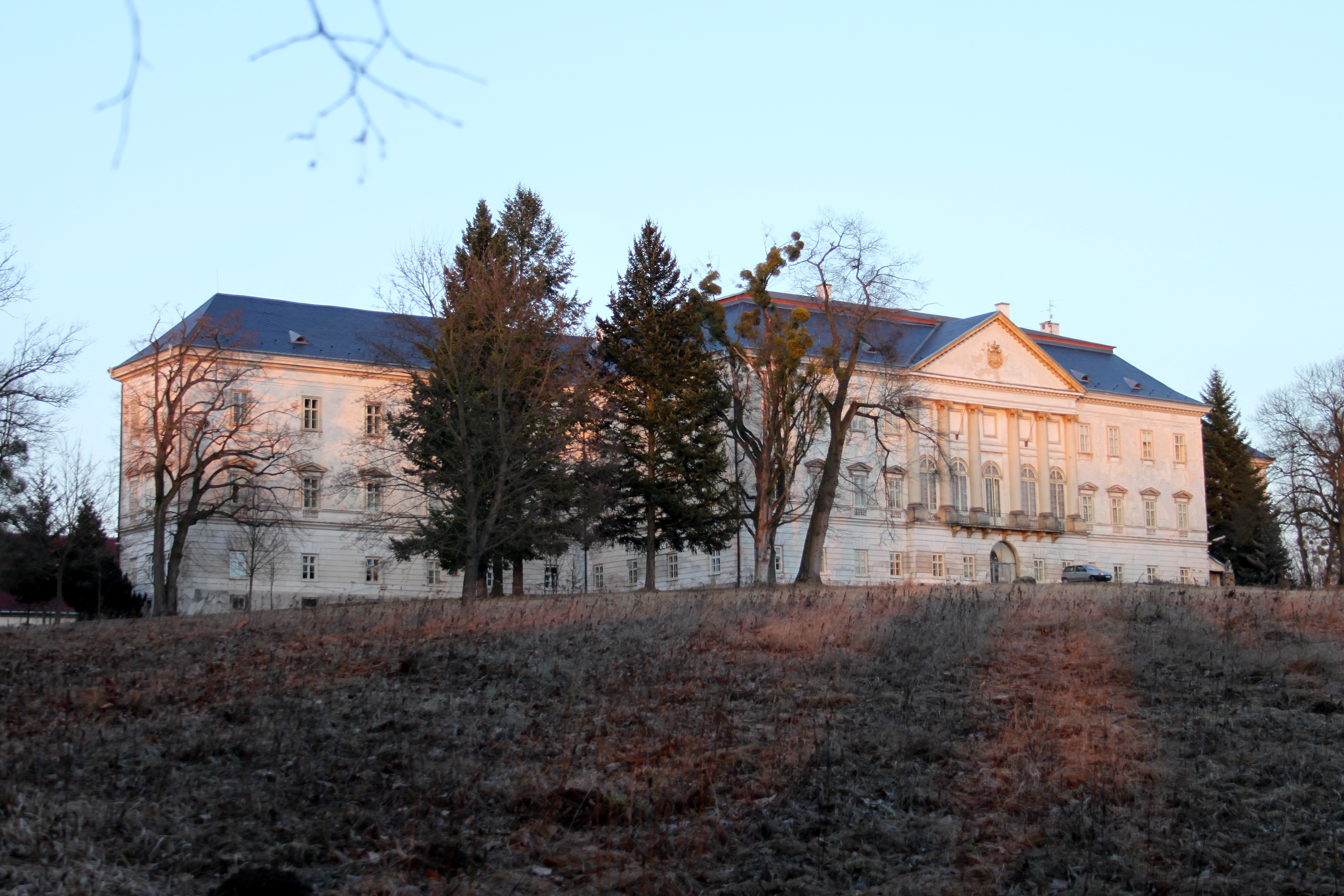 Nové Zámky u Litovle, pohled od louky u řeky Moravy.